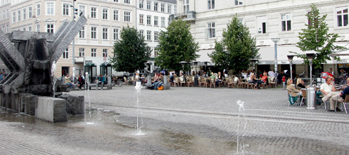 Skt. Hans Torv